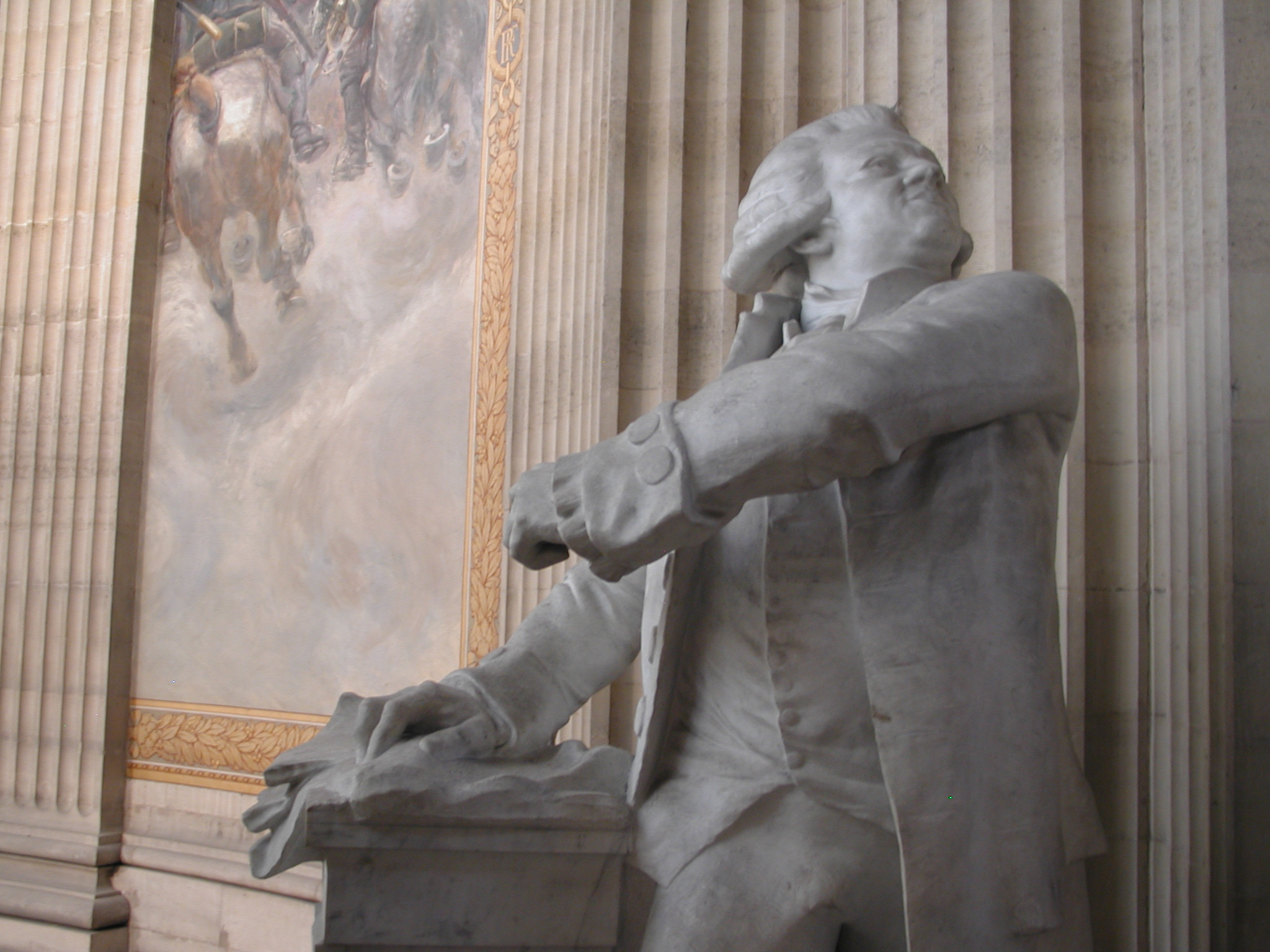 Mirabeau par le sculpteur Injalbert au Panthéon de Paris